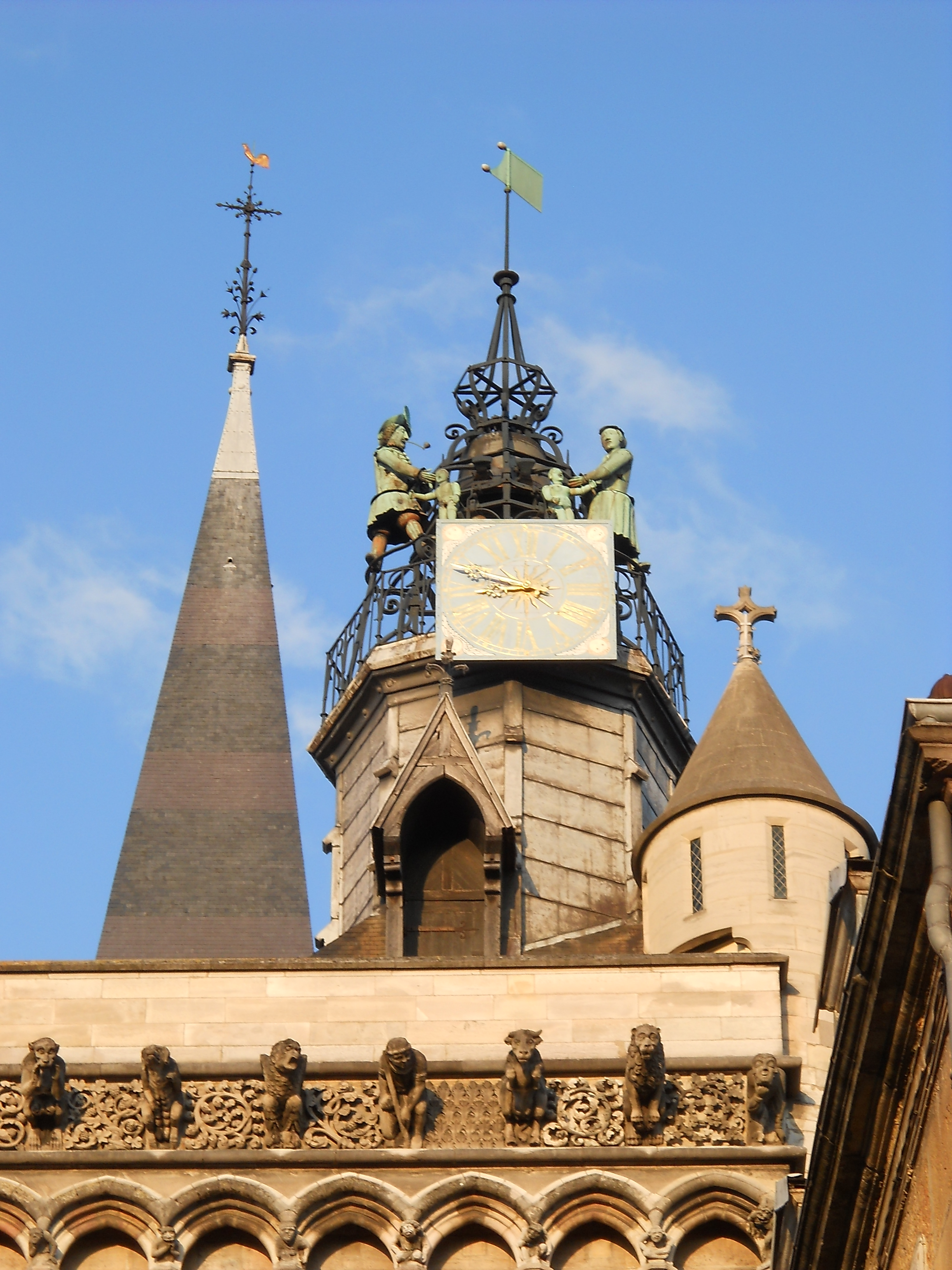 Église Notre-Dame (ClasséInscrit), Dijon, France .